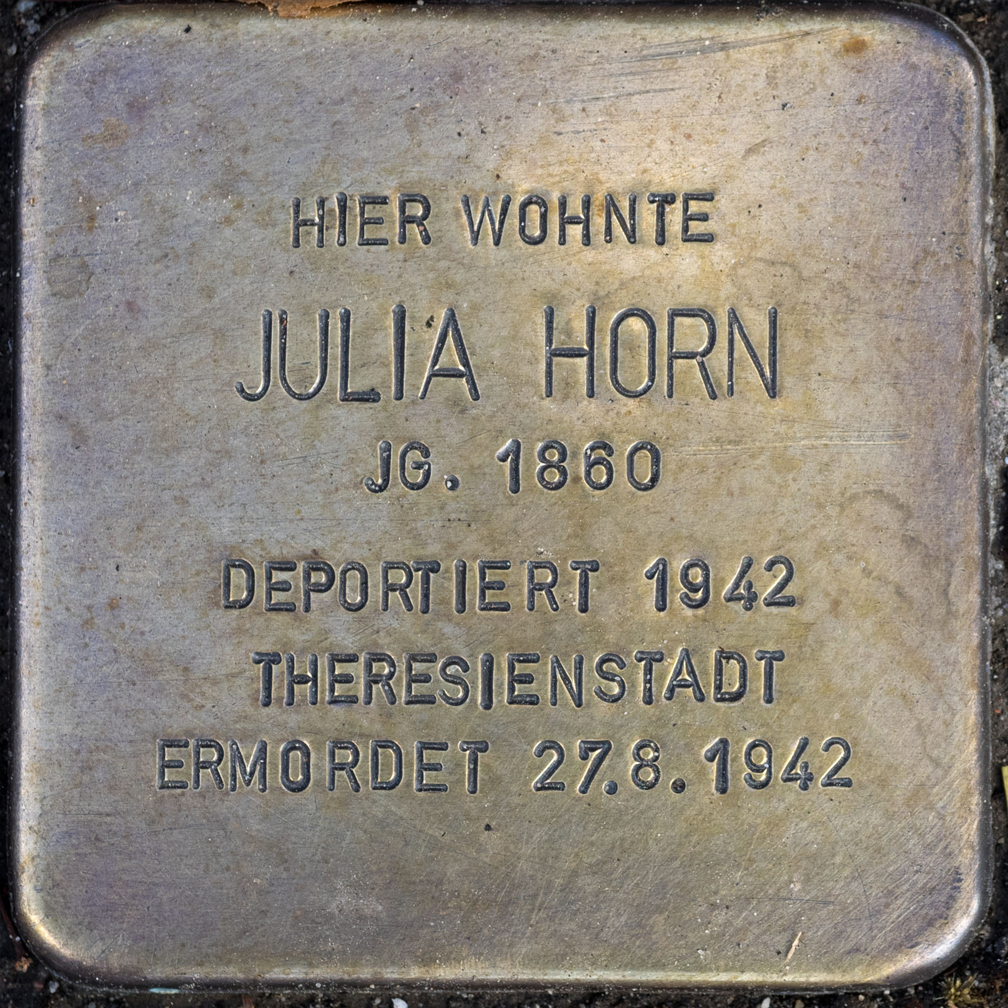 2016 Stolpersteine ToeVo Horn Julia